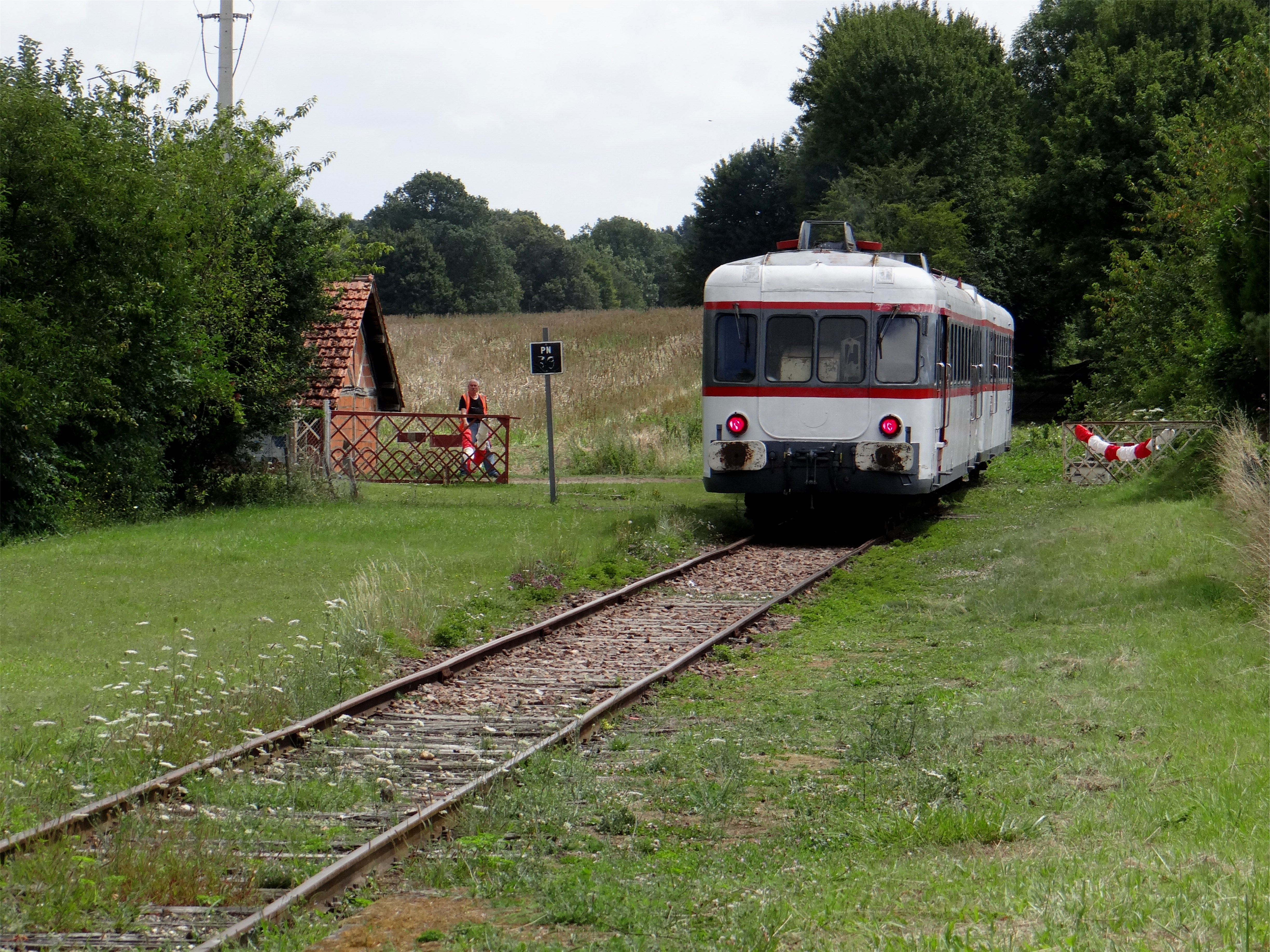 Train touristique à la sortie de la gare de Villiers-Saint-Benoît, Yonne, France.